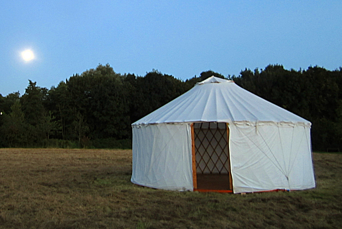 Lazaruswiese im Landschaftspark Mühlenhunt in Oldenburg (Oldb), Jurte des Kultur- und Kunstfestes Freifeld Jurten, 2016